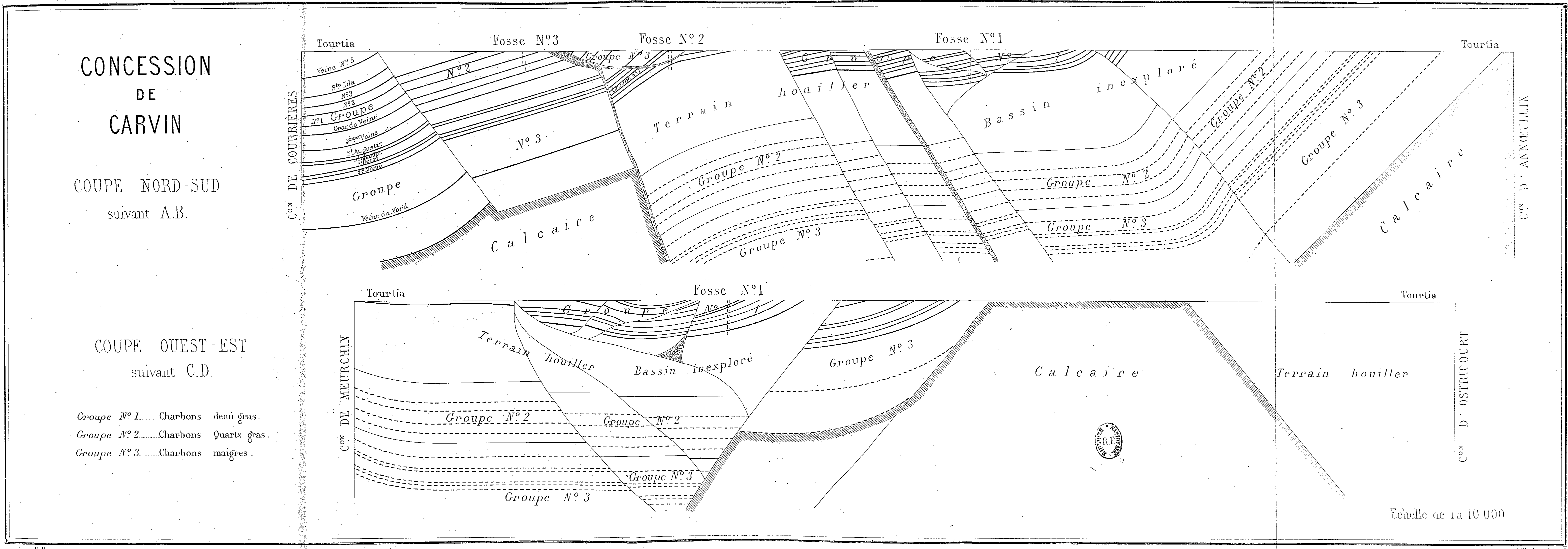 Coupes transversales via les divers puits de la Compagnie des mines de Carvin.